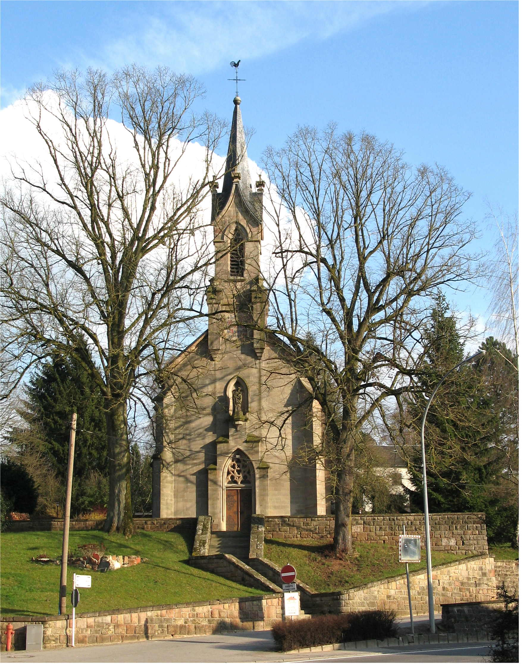 Sujet : Kierch vu Räichel Source : Eege Foto Johnny Chicago (Abrëll 2006) Lizenz